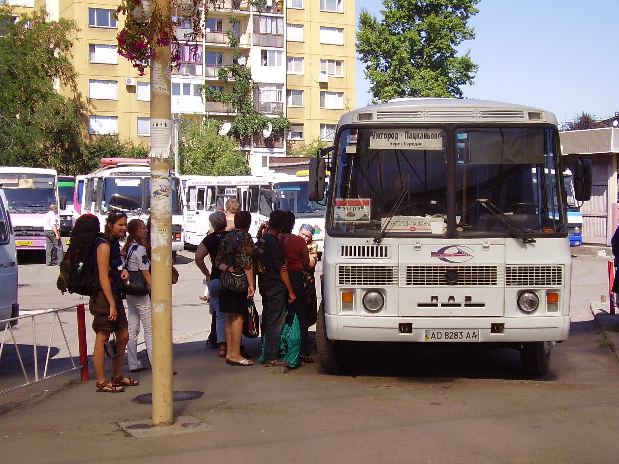 Pravidelný autobusový spoj z autobusového nádraží v Užhorodě